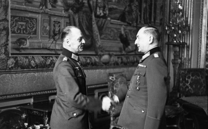 Generalfeldmarschall von Witzleben 40 Jahre Soldat. Generalfeldmarschall von Rundstedt überbrachte seine Glückwünsche persönlich. PK-Dick (Dieck)-Scherl Bilderdienst 3489-41 "FR" OKW März 1941